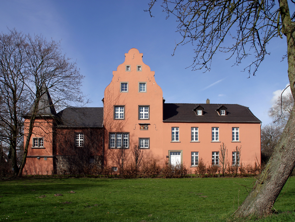 Haus Broich im Troisdorfer Stadtteil Spich